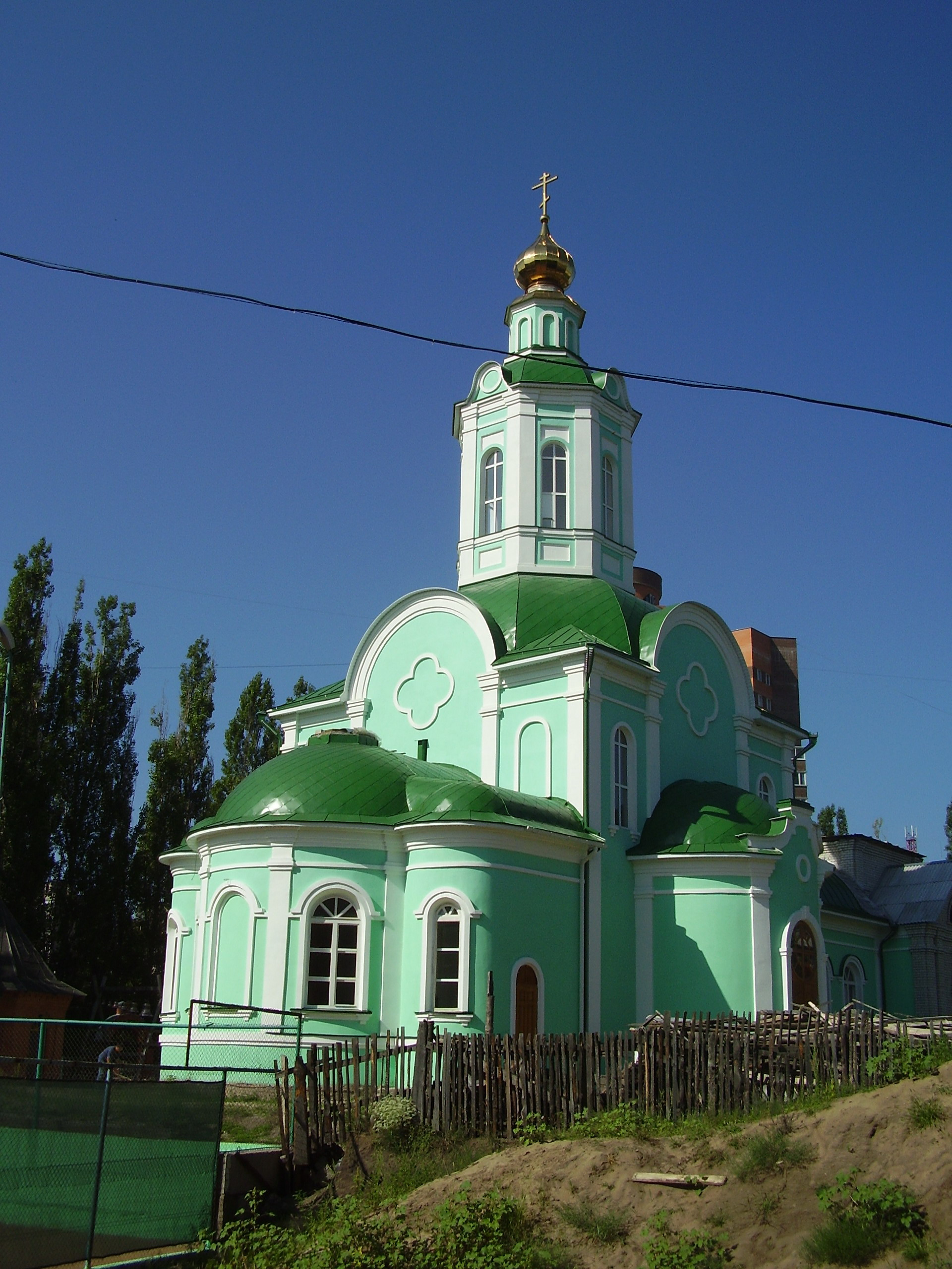 Воронеж,Свято-Троицкая_церковь в Юго-западном районе